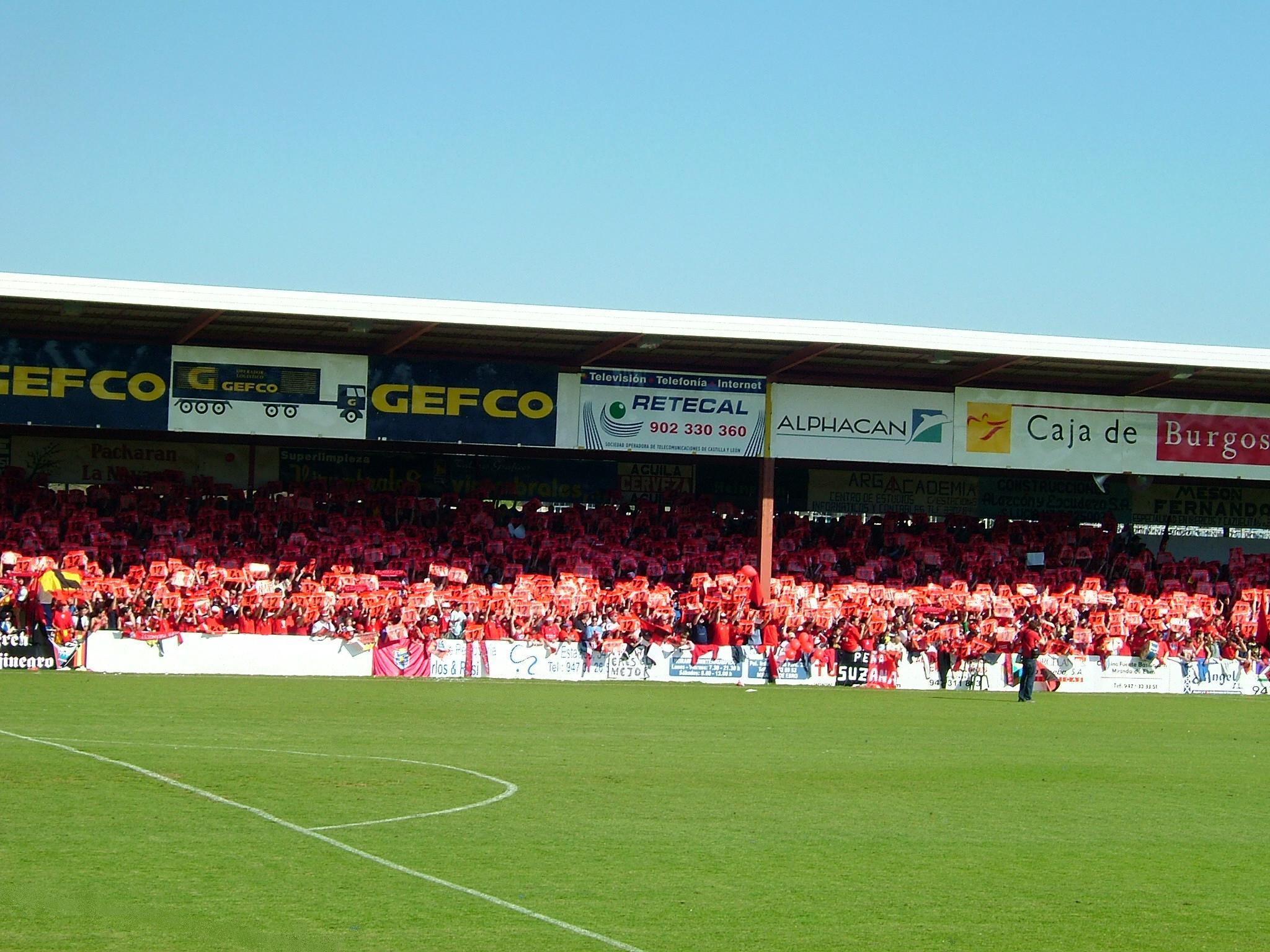 Mirandés - Burgos